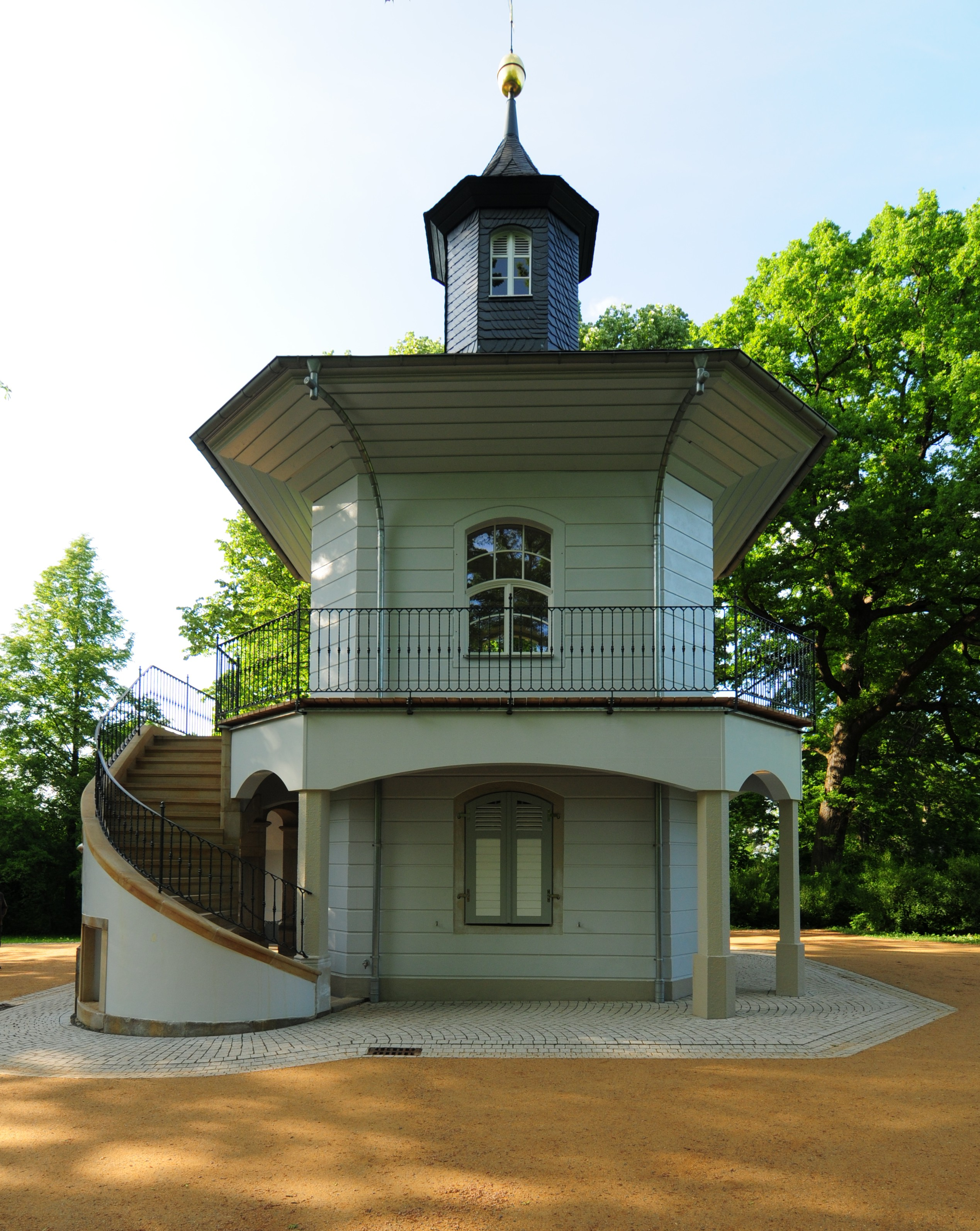 Teehaus, etwa 1789 (Rokokobau mit Einflüssen der Chinoiserie. DEHIO Sa II, S. 1107) im Park des Schlosses Planitz, Zwickau (Sachsen, Deutschland)